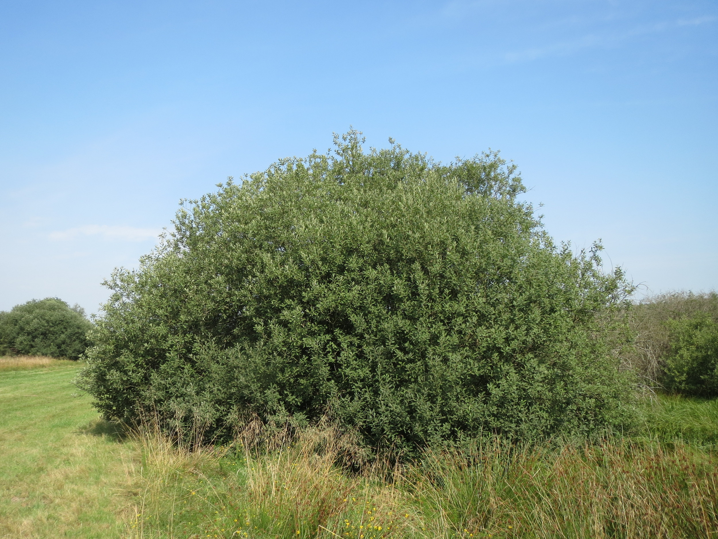 Asch-Weide (Salix cinerea) im Naturschutzgebiet Mürmes